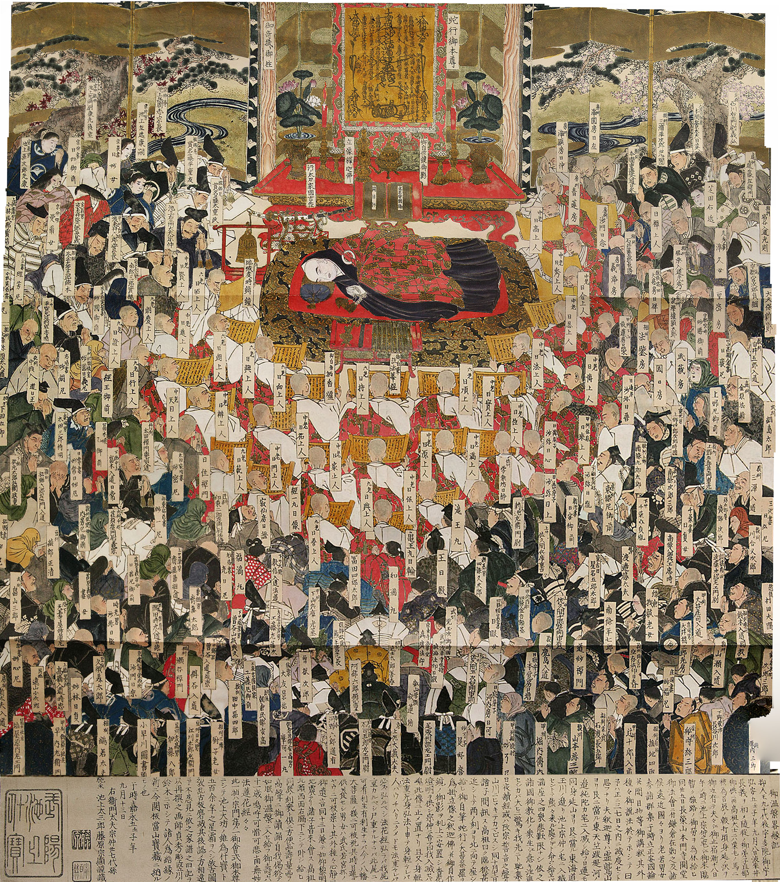 池上入滅図 江戸時代のもの